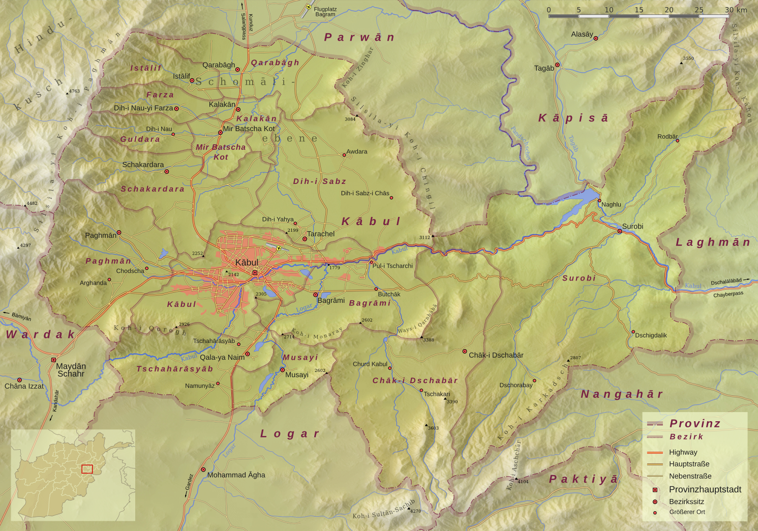 Topographische Karte der Provinz Kabul, Verwaltungsgliederung gemäß dem 2005 eingeführten 34-Provinzen/397-Bezirke-Schema